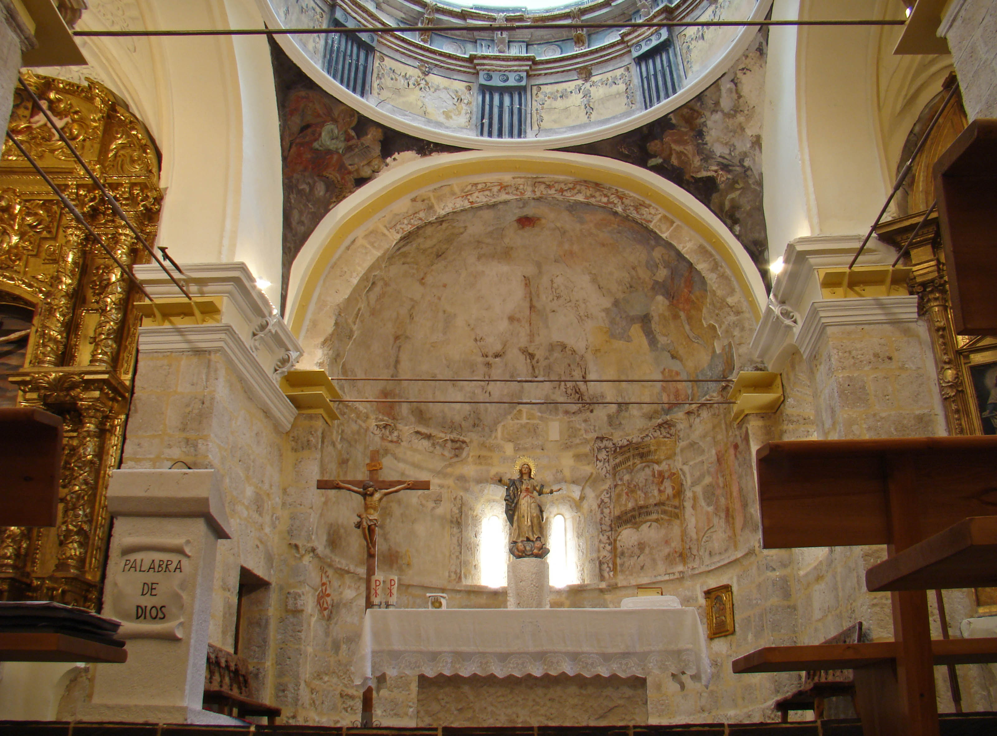 Iglesia de la Asunción en la localidad de Castrillo de Duero, provincia de Valladolid, España. Ábside del presbiterio románico donde se conservan unas pinturas murales. Altar mayor con la imagen de la titular, la Asunción, del siglo XVII.